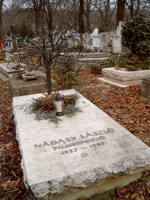 Nádasy László (Bp., 1927. febr. 25. – Bp., 1983. szept. 12.): filmrendező, forgatókönyvíró sírja Budapesten. Farkasréti temető: 25-9-16.